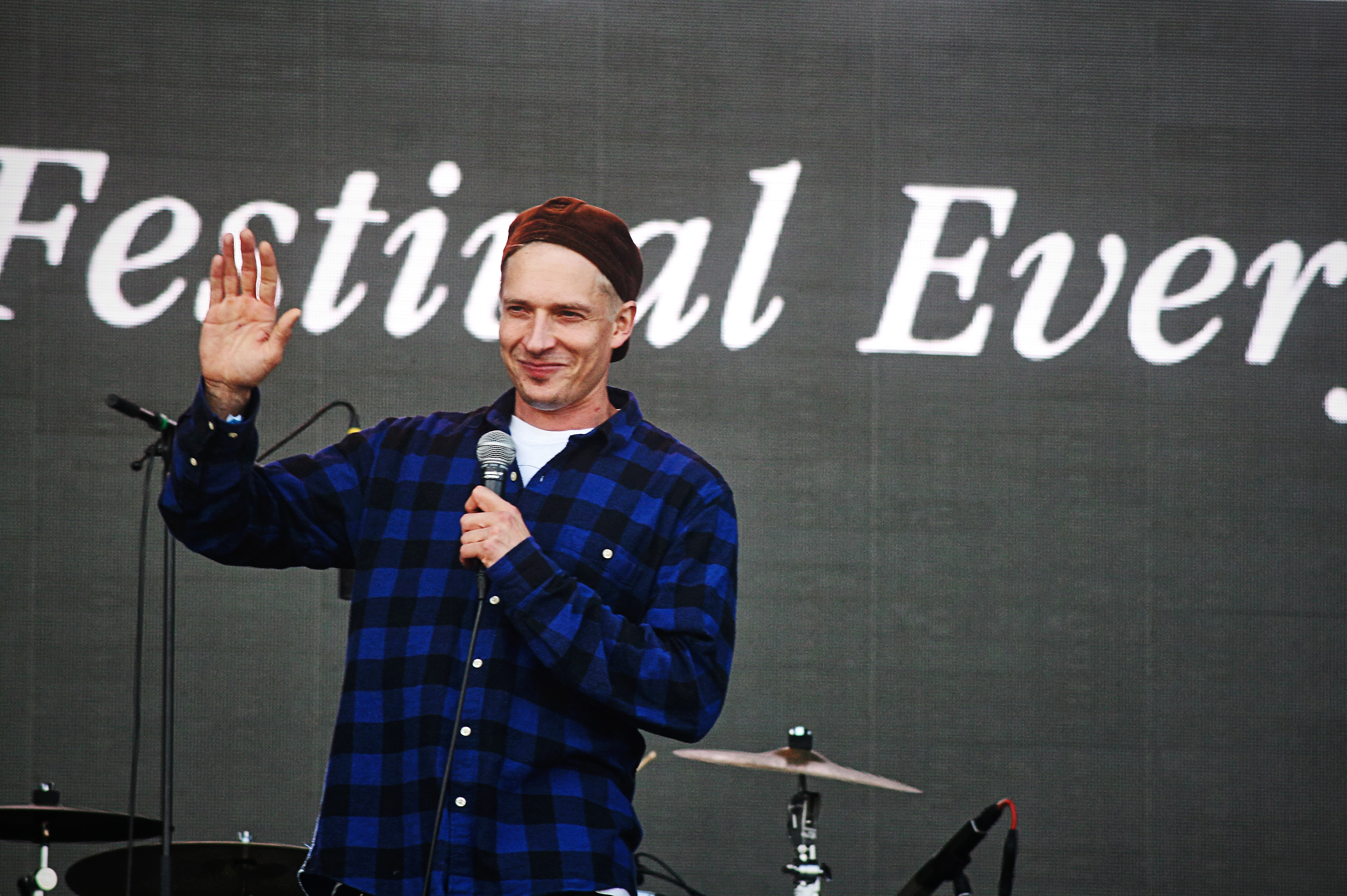 Asa livenä bändinsä kanssa päälavalla Pori Jazzeilla 2015